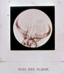 Mikrofotografie von Julius Stinde: "Fuss der Fliege"